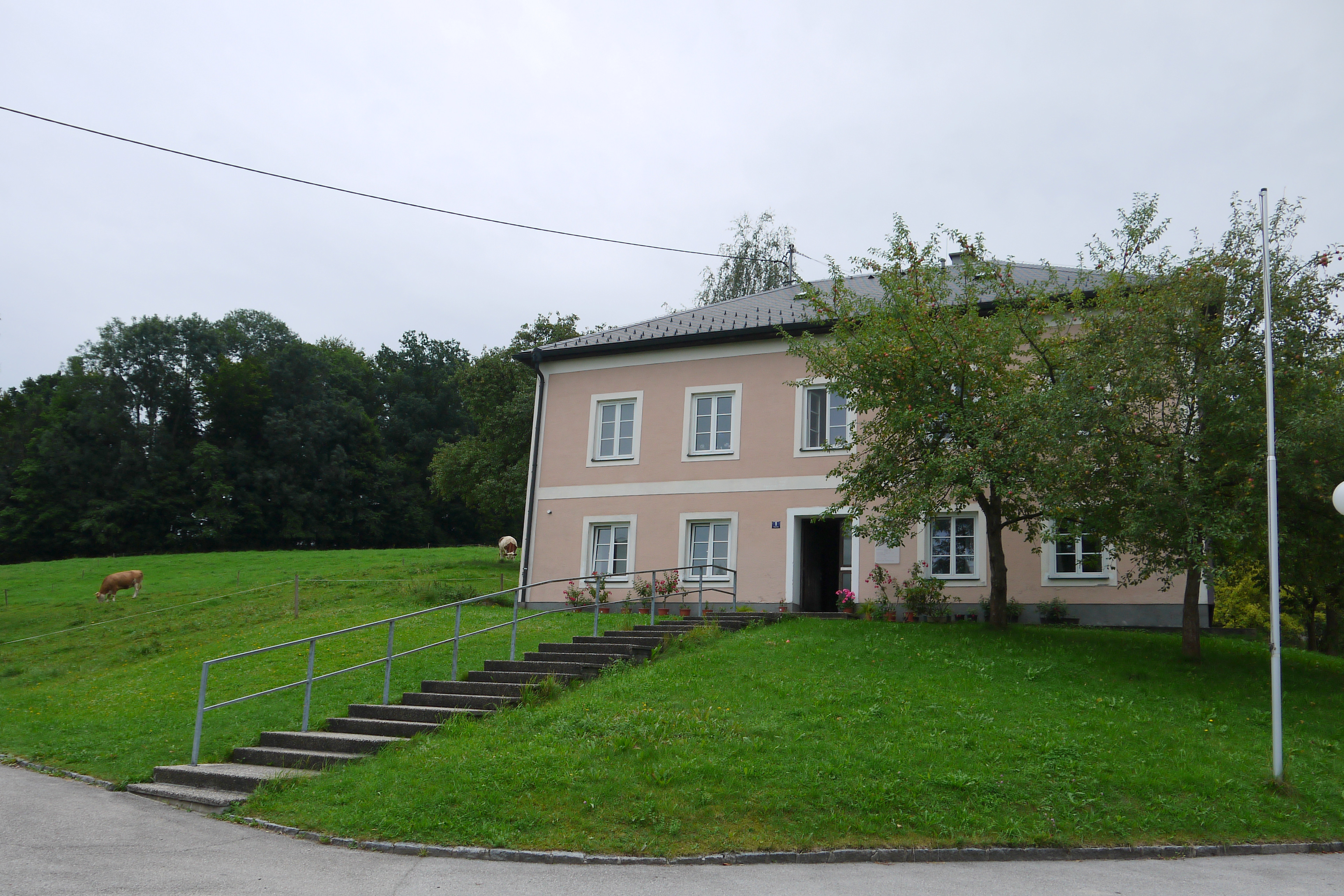 Pfarrhof